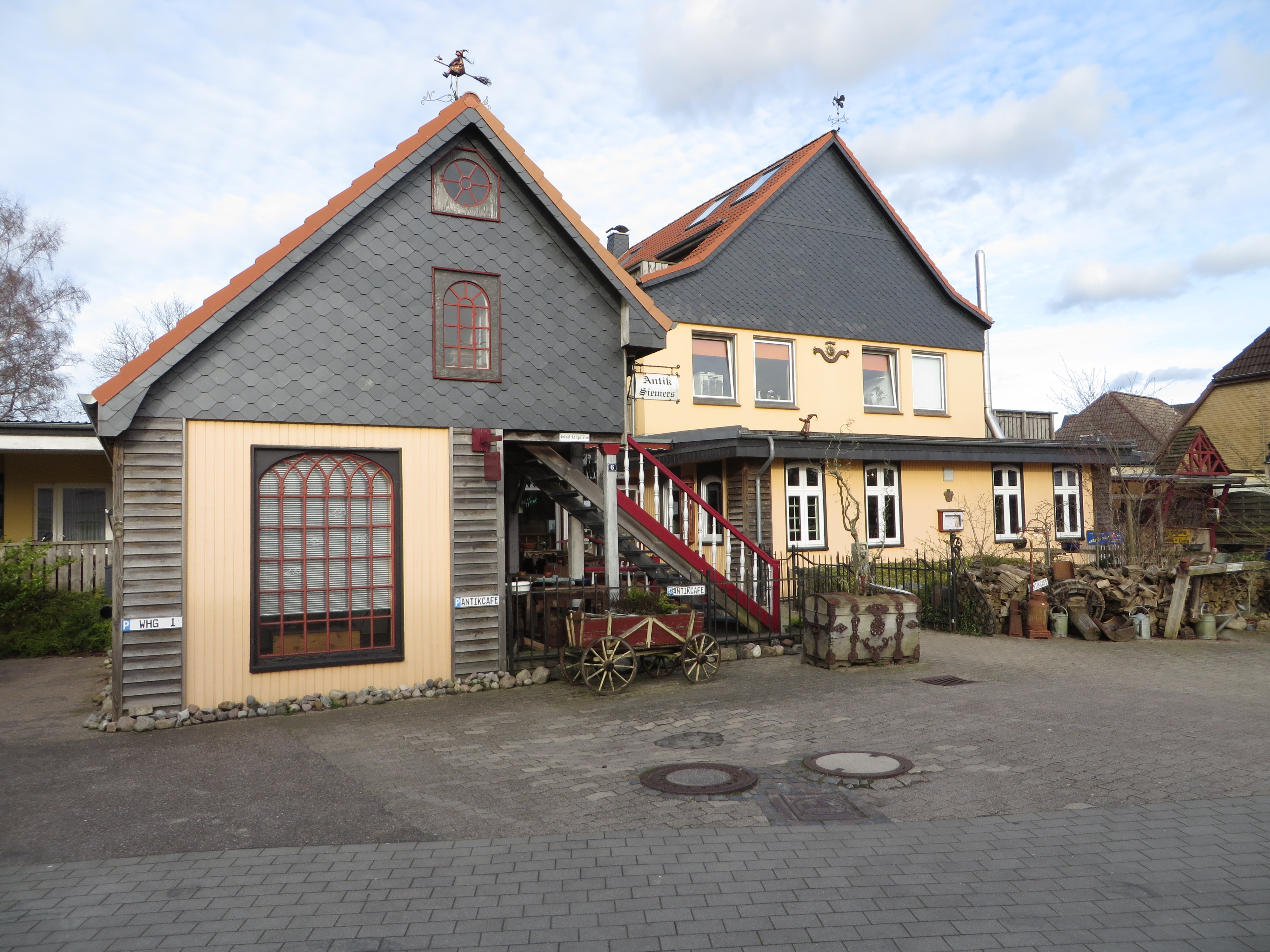 Siemers Antik und Cafe (Flensburg-Blasberg April 2015), Bild 11